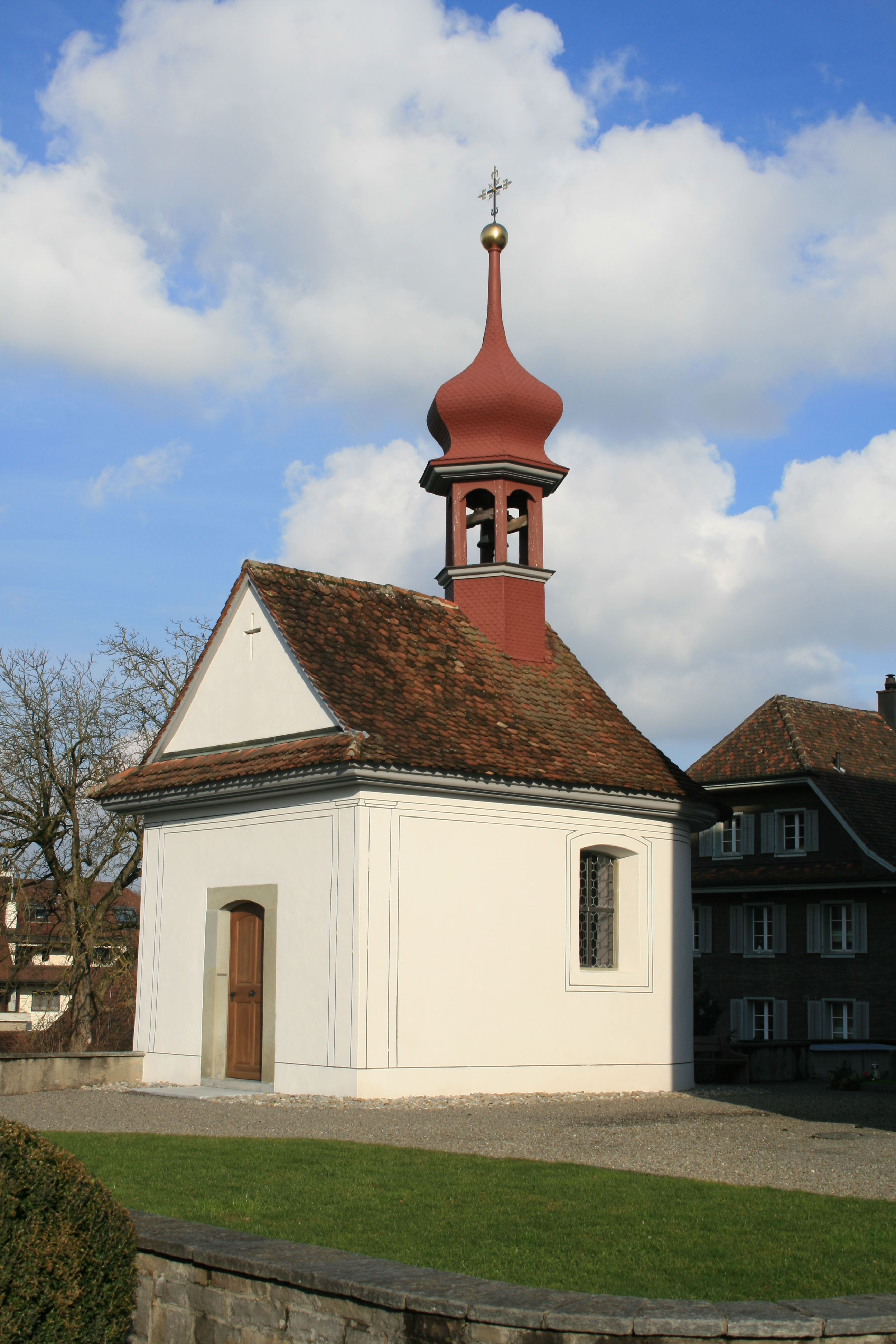 Dietwil